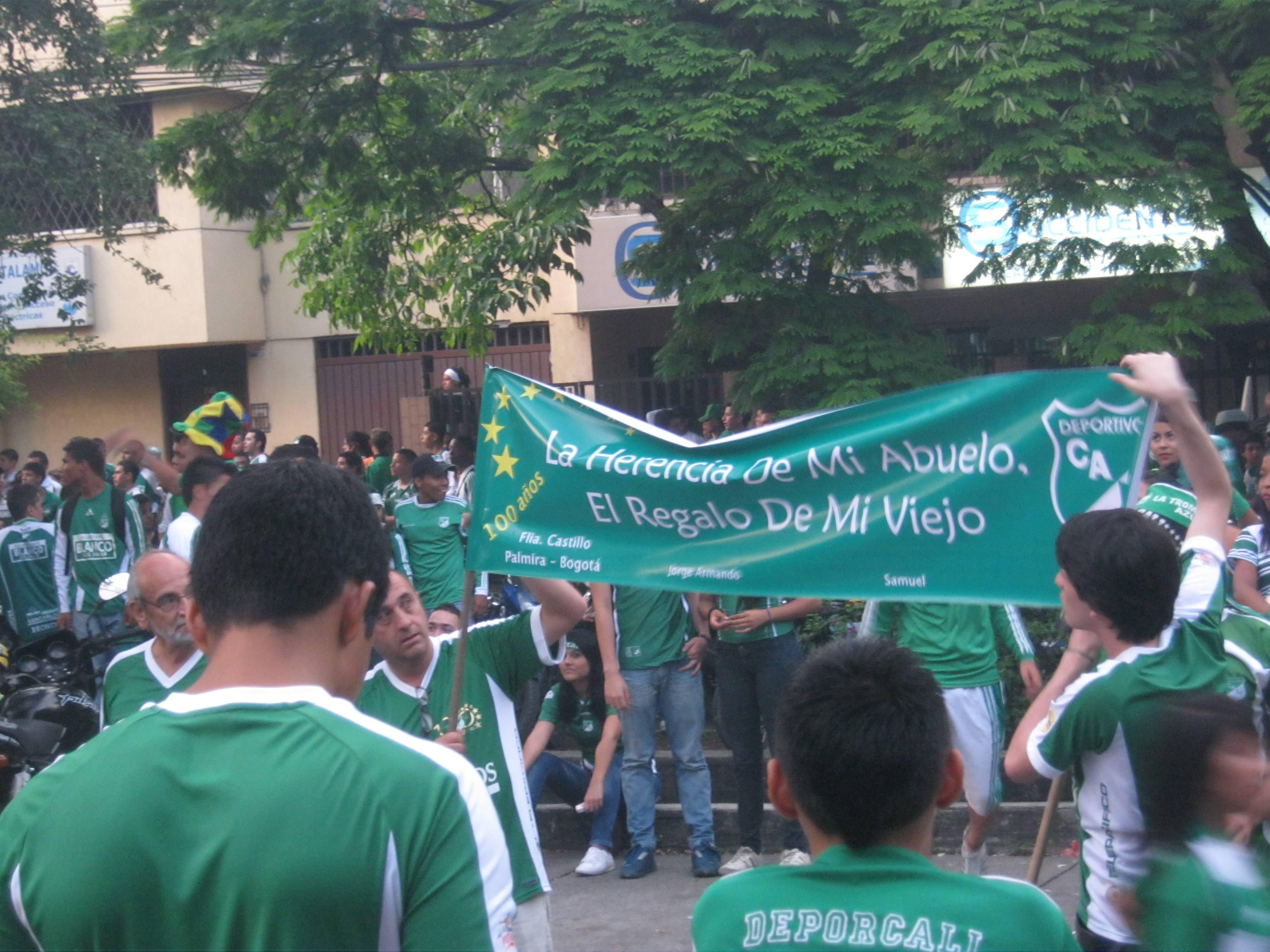 Festejo por los 100 años del Deportivo Cali